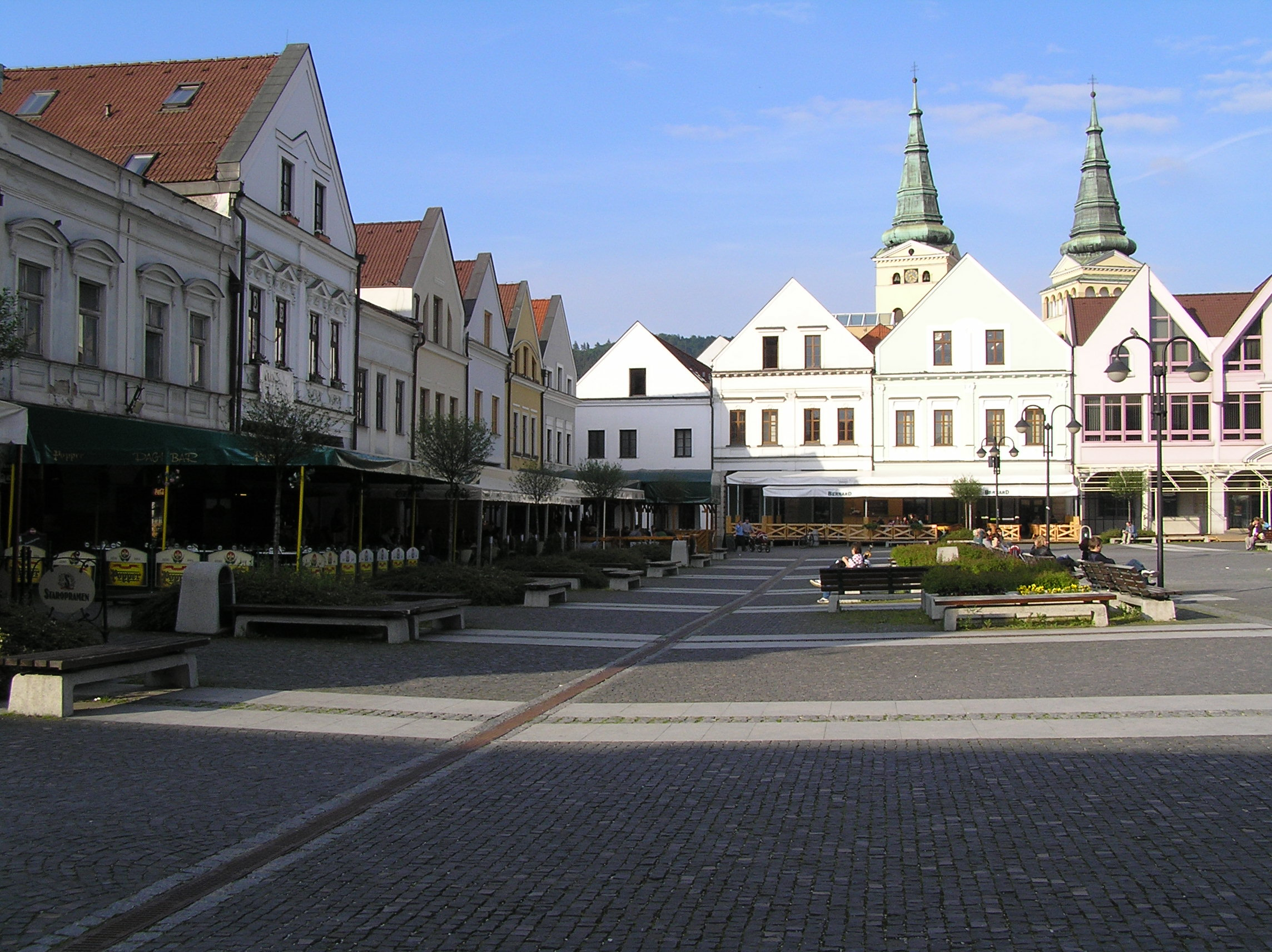 pohľad na juh Mariánske námestie, Žilina